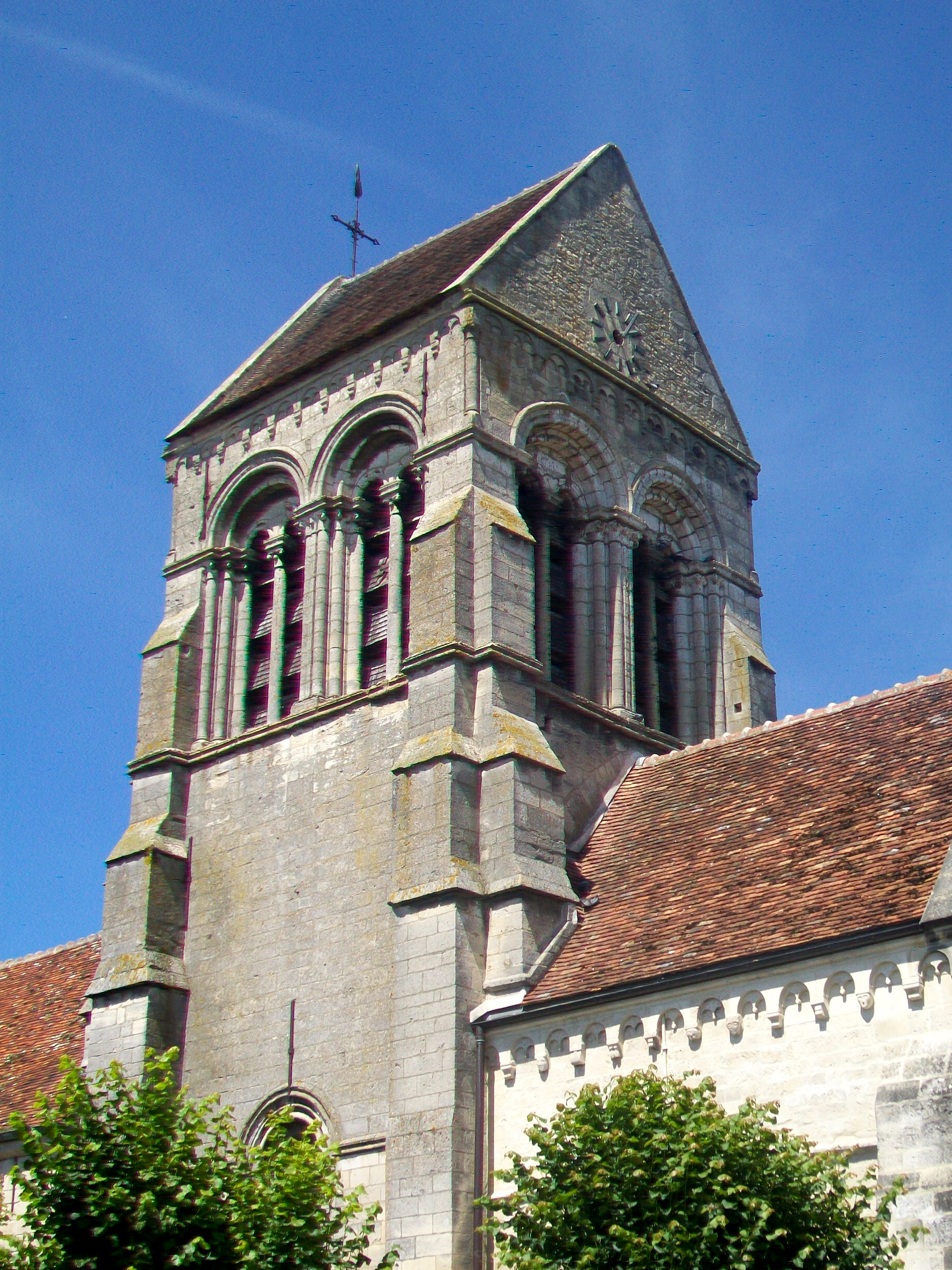 Partie supérieure du clocher.